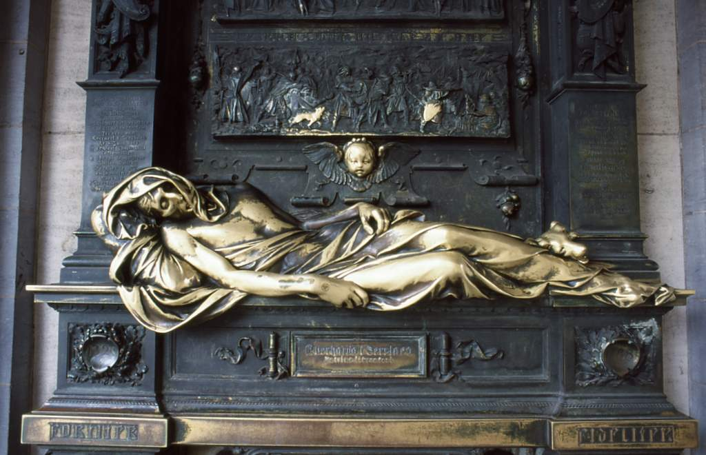 A brüsszeli Grote Markt-on található Everaard t’Serclaes emlékművének részlete (Belgium)